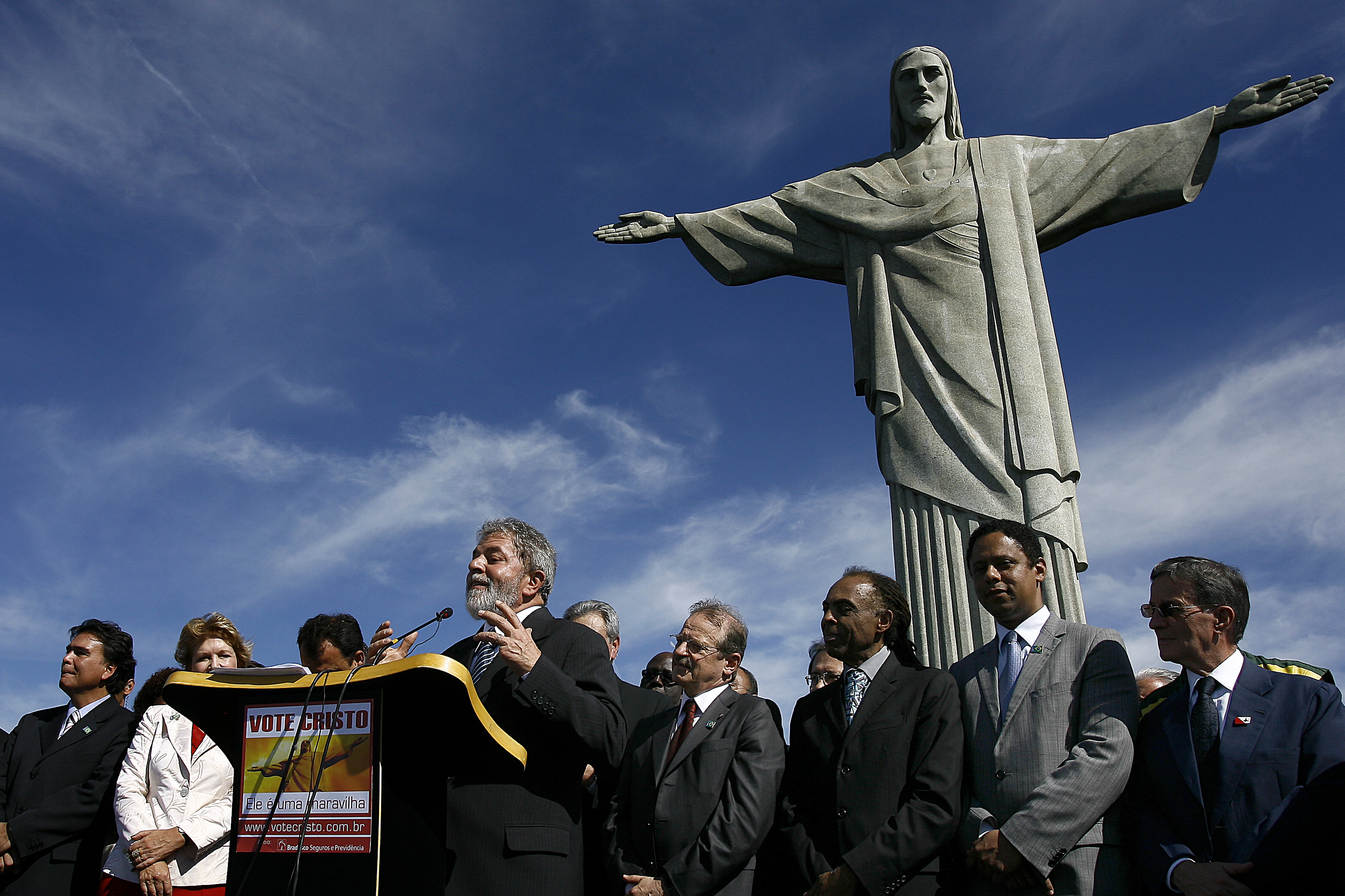 O presidente do Brasil, Luís Inácio Lula da Silva, à frente do Cristo Redentor.